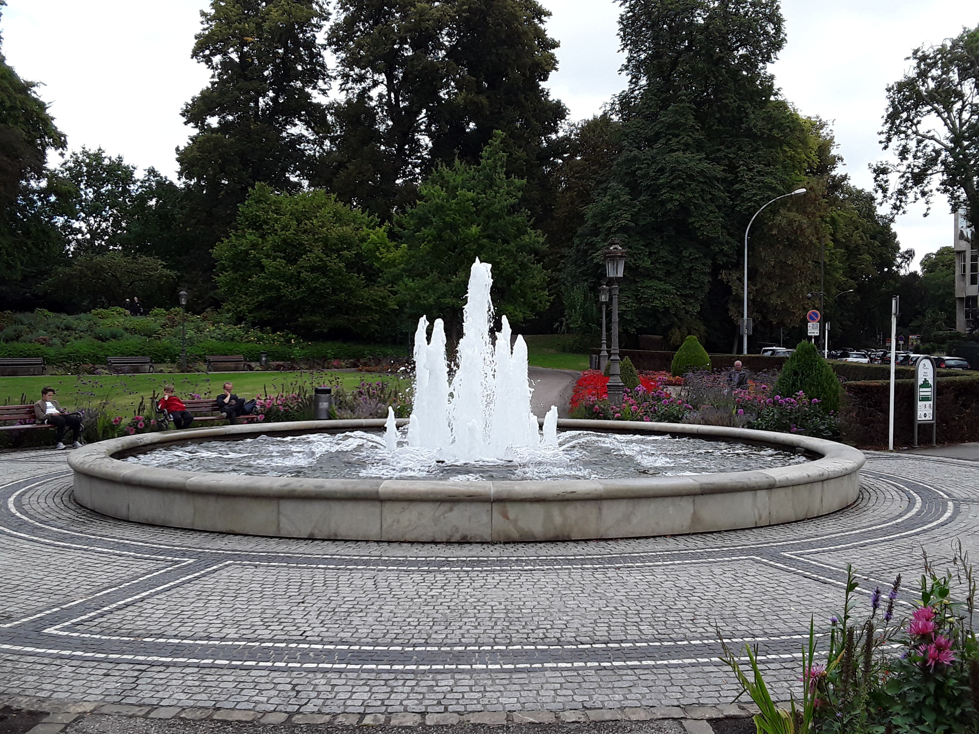 Fontaine aux alentours du monument de la Princesse Amélie au parc municipal à Luxembourg